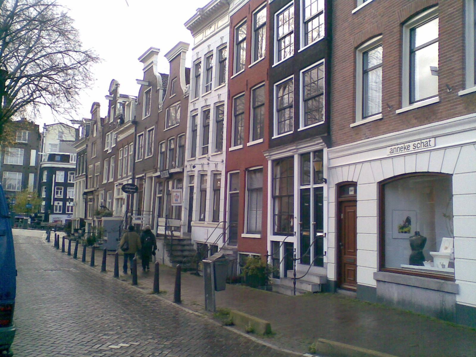 Spiegelgracht Amsterdam This is an image of rijksmonument number 5511 This is an image of rijksmonument number 5512 This is an image of rijksmonument number 5513